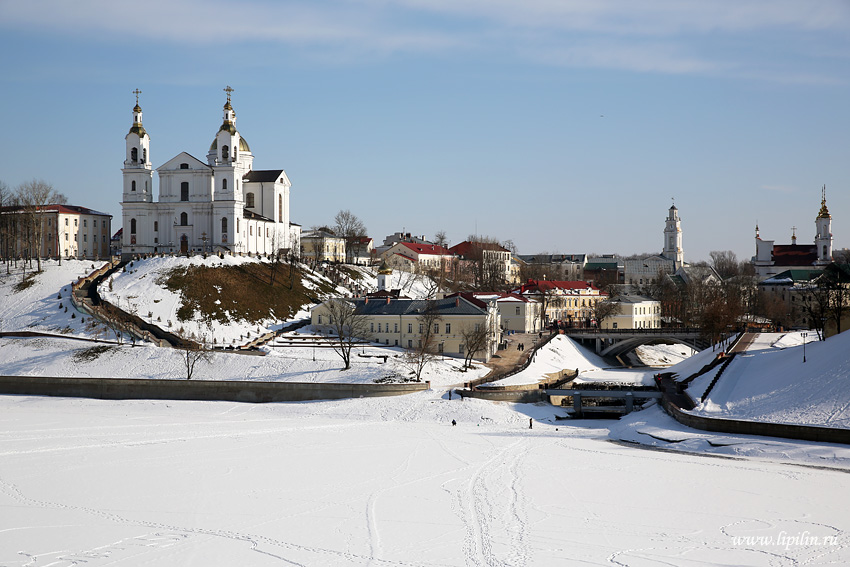 Віцебск.